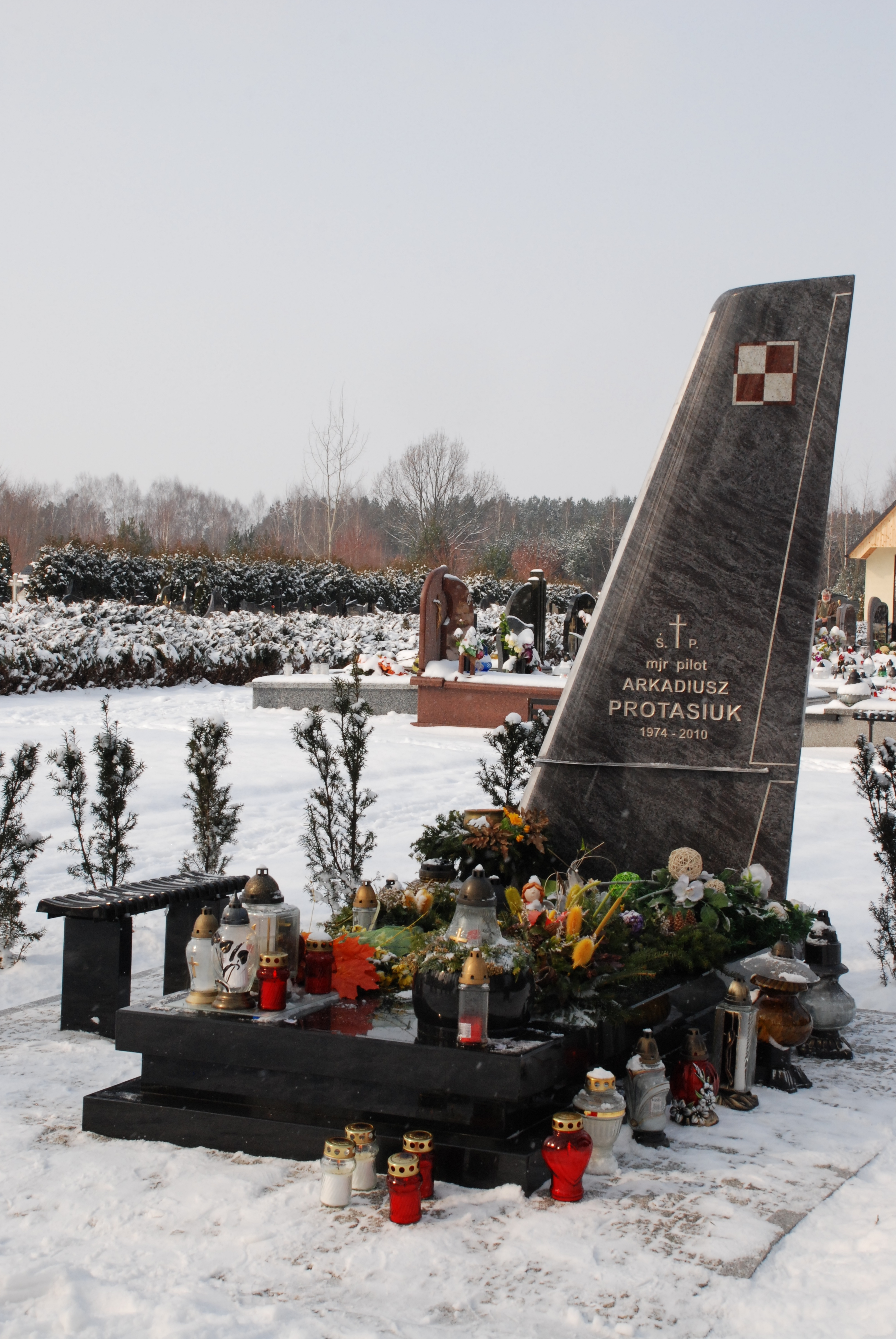 Nagrobek mjra Arkadiusza Protasiuka.